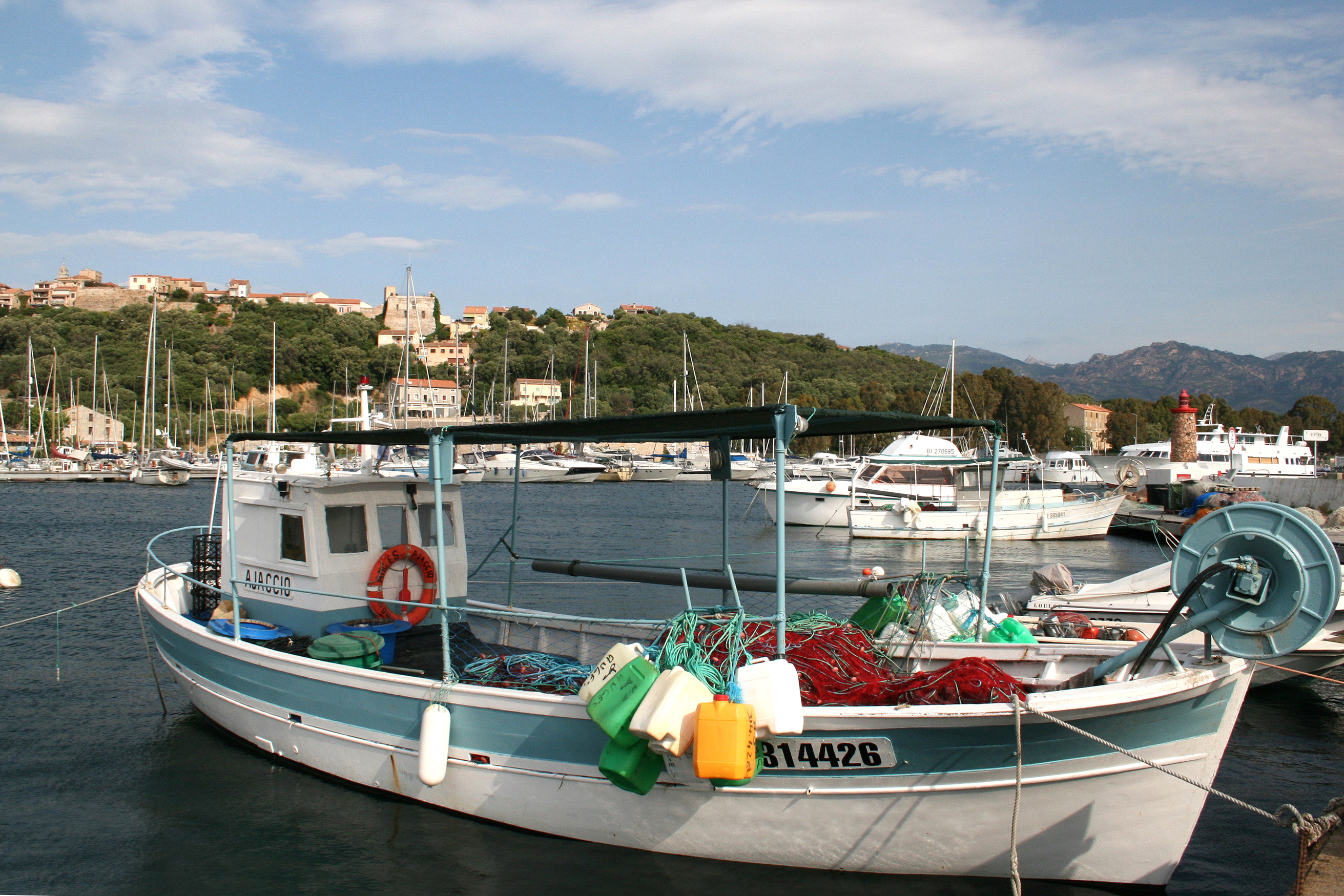 Porto-Vecchio France (Corse du Sud), le port et la vieille ville.